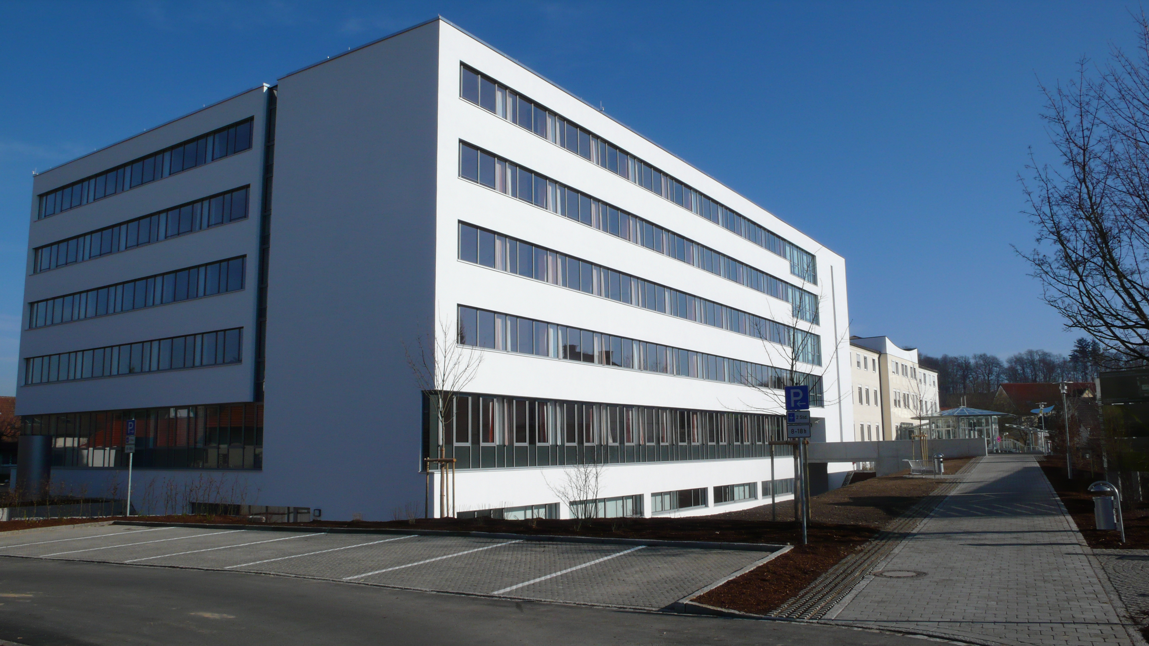 Neues Bettenhaus der Illertalklinik